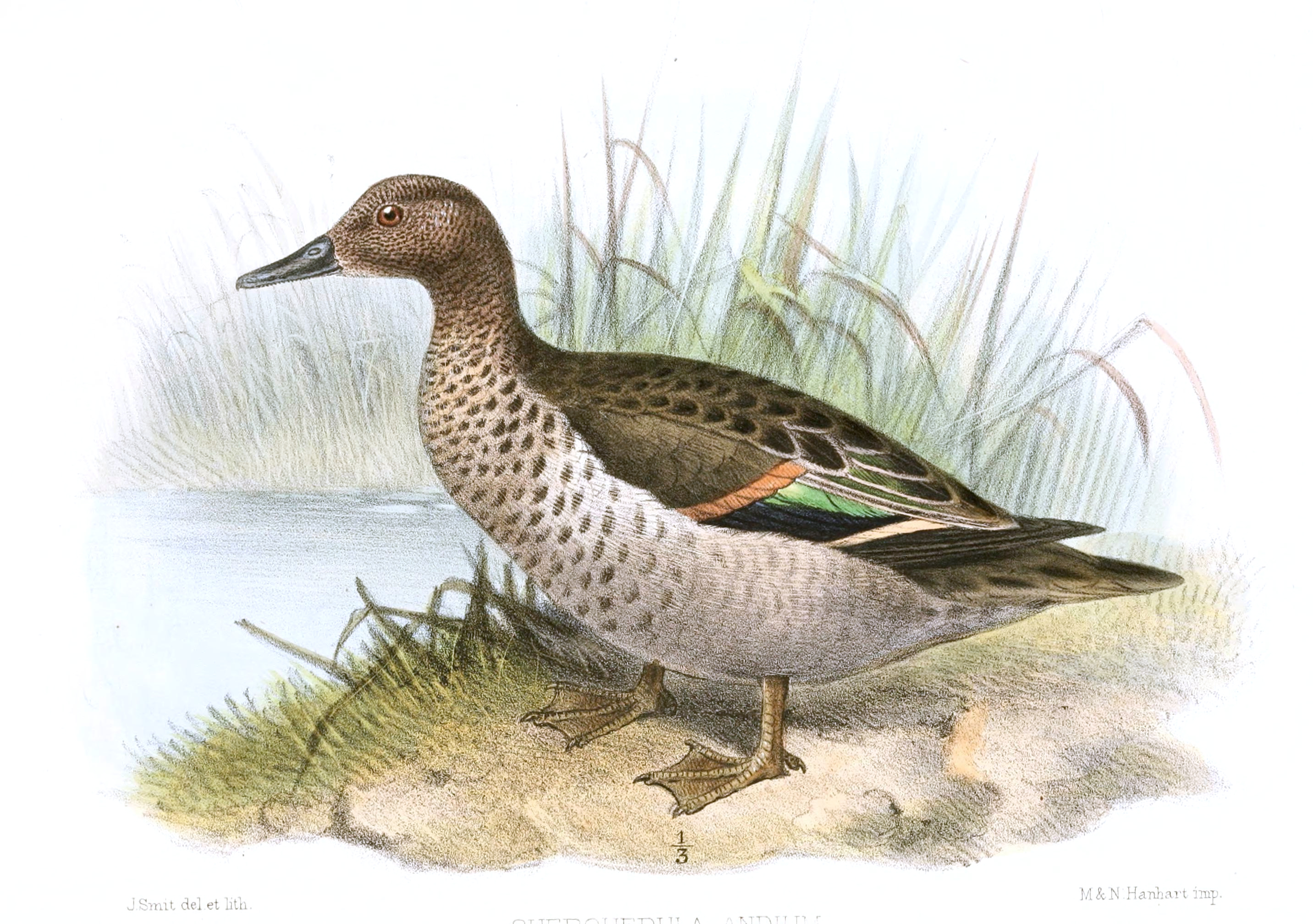 Querquedula andium = Anas andium